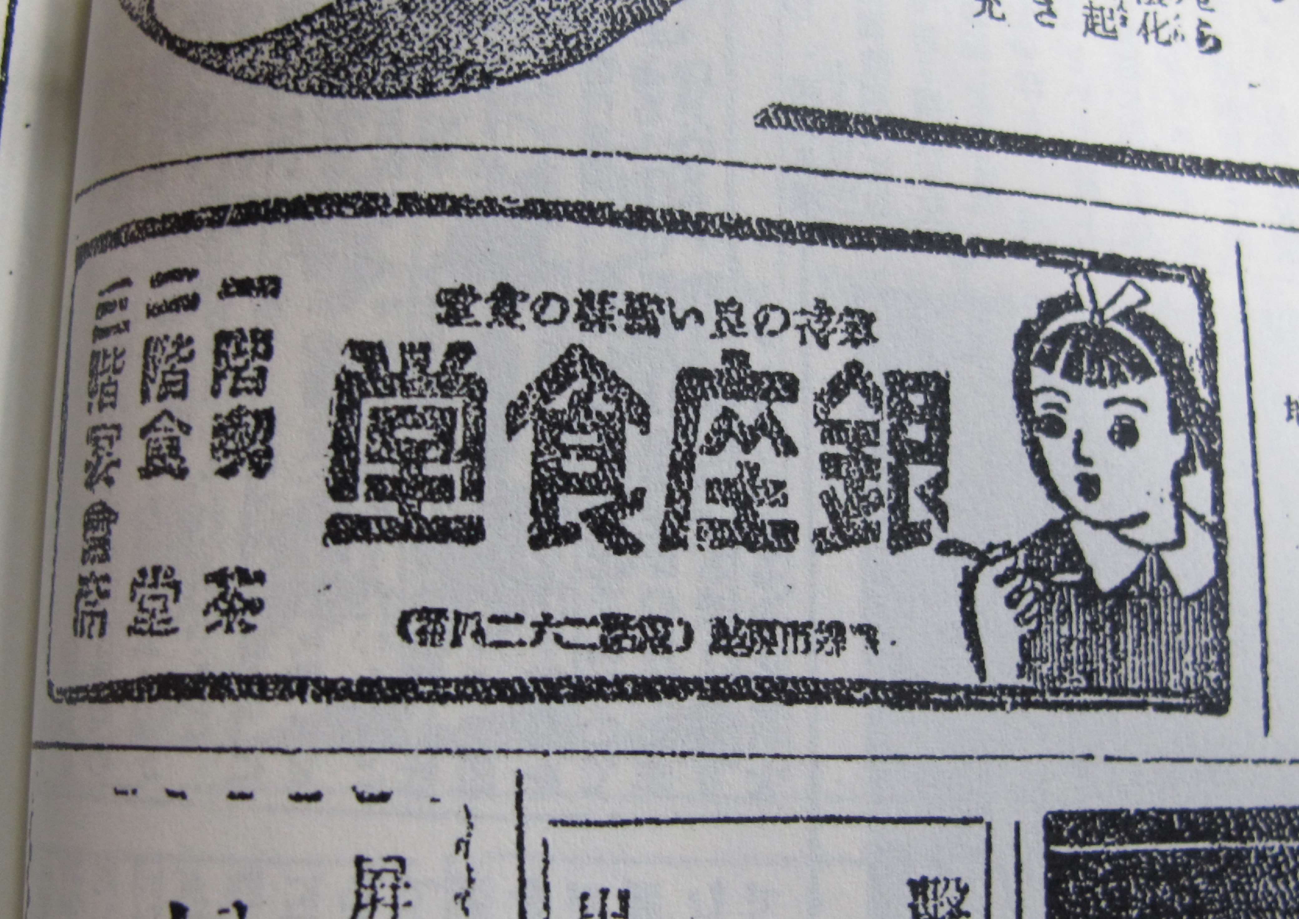 中文（台灣）: 位於高雄銀座(國際商場)內的銀座食堂之廣告，翻攝自1943年2月之高雄新報